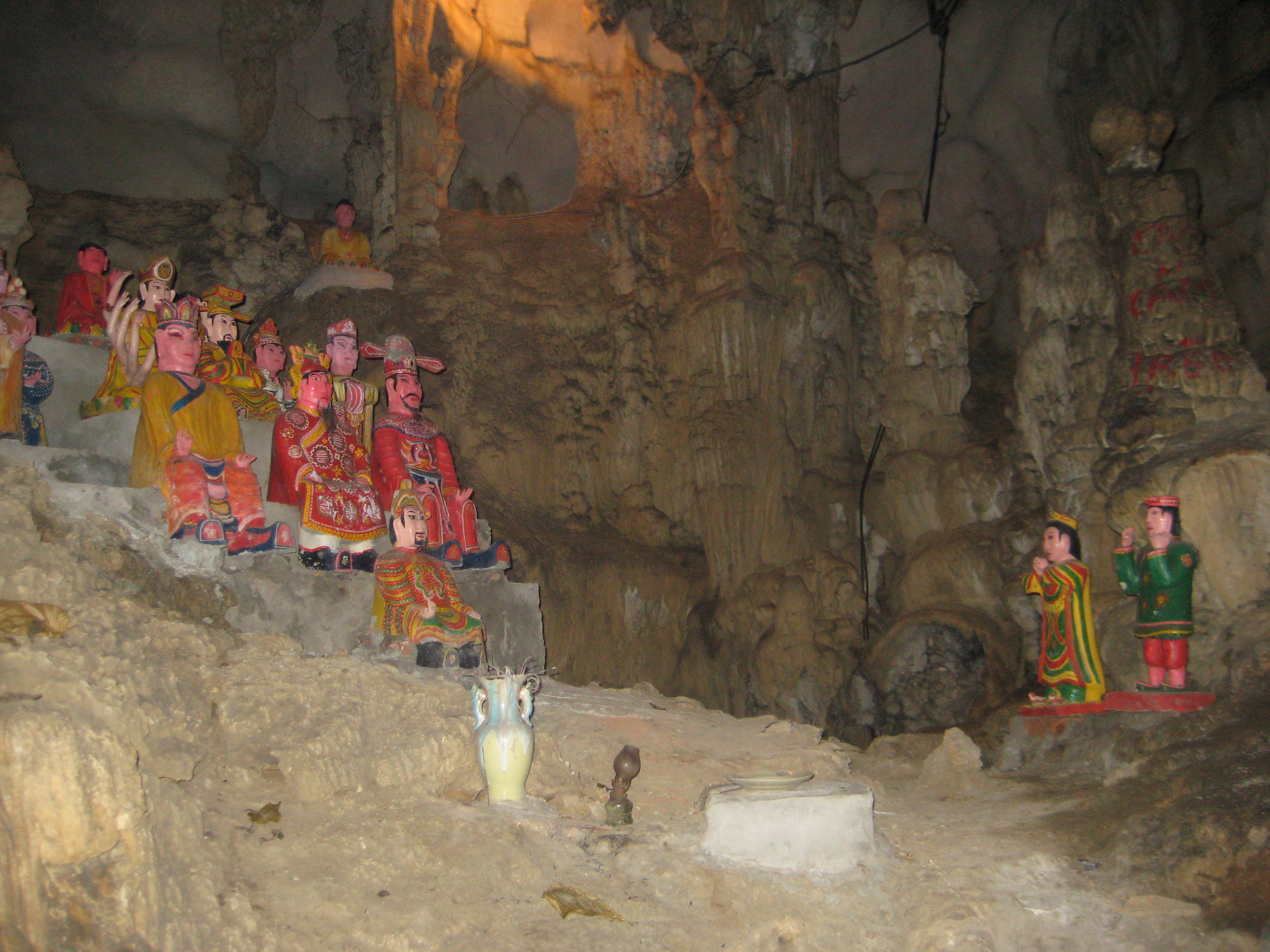 Một thắng cảnh ở khu du lịch Tam Cốc - Bích Động